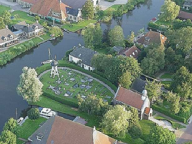 Een overzicht van Broek, aan weerszijden van de vaart liggen woningen. In het midden is de klokkenstoel te zien.